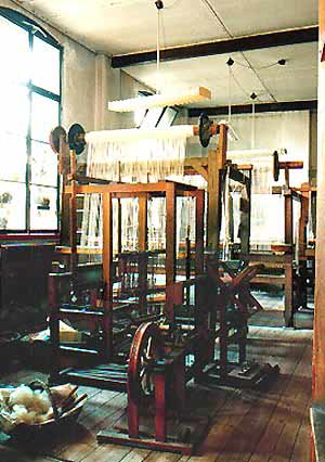 Das aktive Museum "Henni Jaensch-Zeymer" zeigt einen Überblick zum Kunsthandwerk des Leinenwebens, des Handwebens und der Geschichte des Leinens, auf über 10 historischen Handwebstühlen wird heute noch die Kunst des Handwebens ausgeführt.